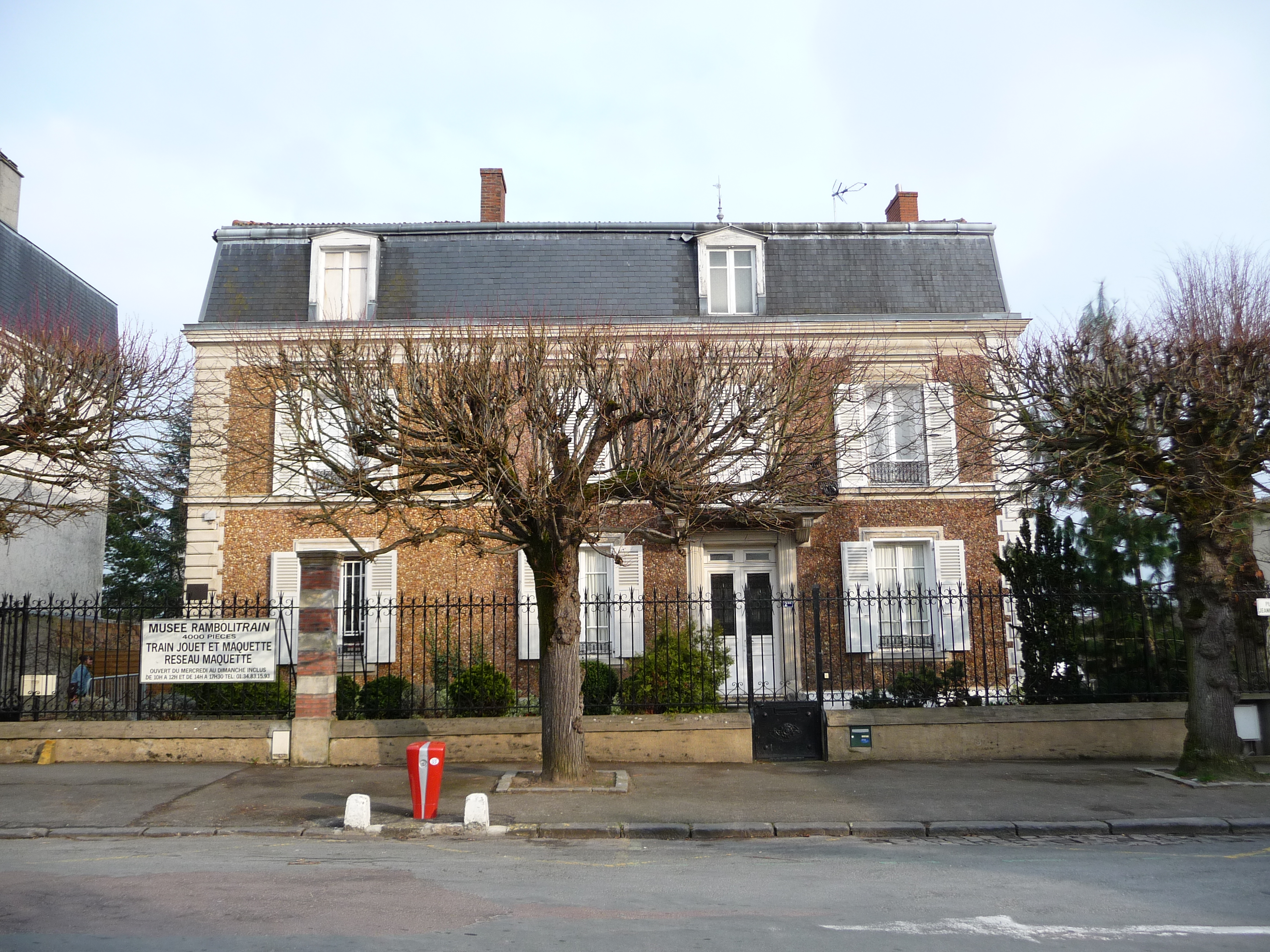 Façade du Rambolitrain